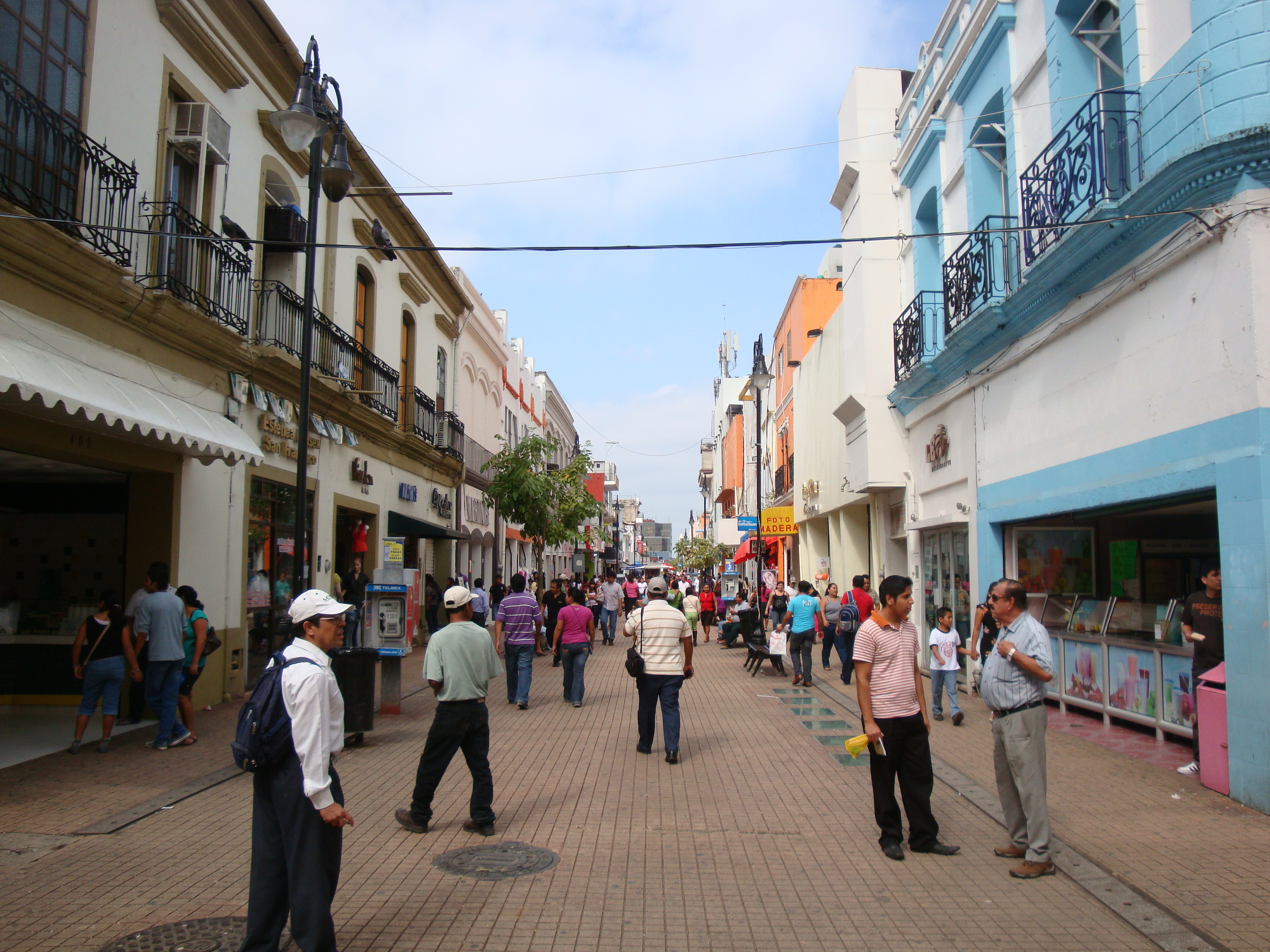 Aspecto de la calle Benito Juárez, de la "zona Luz", en el centro histórico de la ciudad de Villahermosa, estado de Tabasco, México.